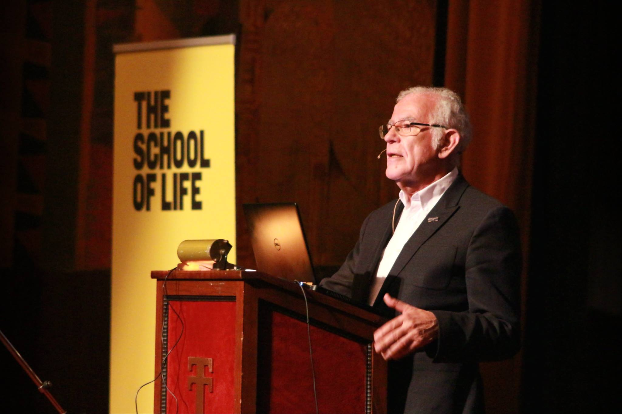 Dick Swaab bij the School of Life